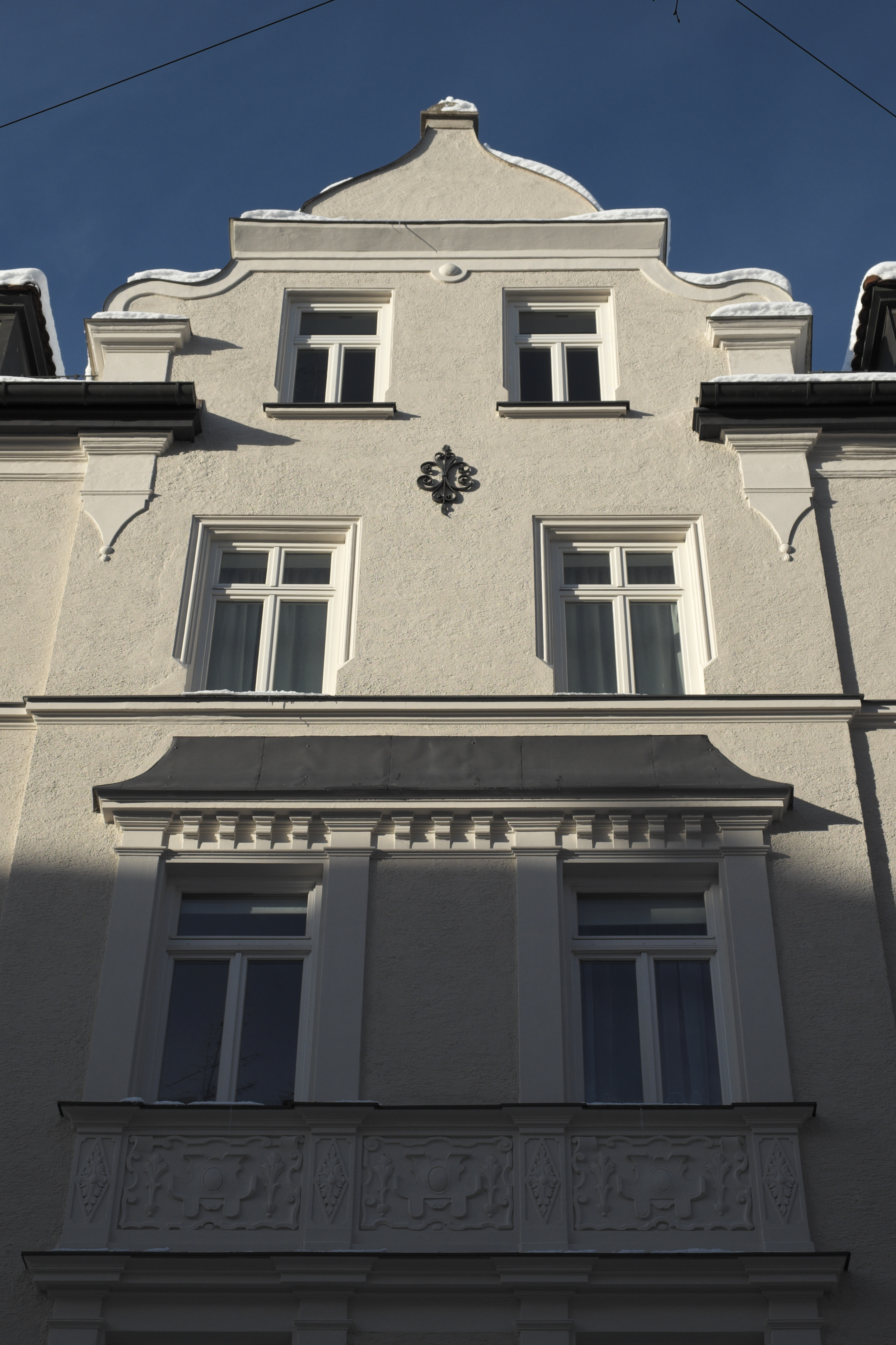 Mietshaus in der Belfortstraße 5 in Haidhausen im Stadtbezirk Au-Haidhausen in München (Bayern/Deutschland), um 1890/1900